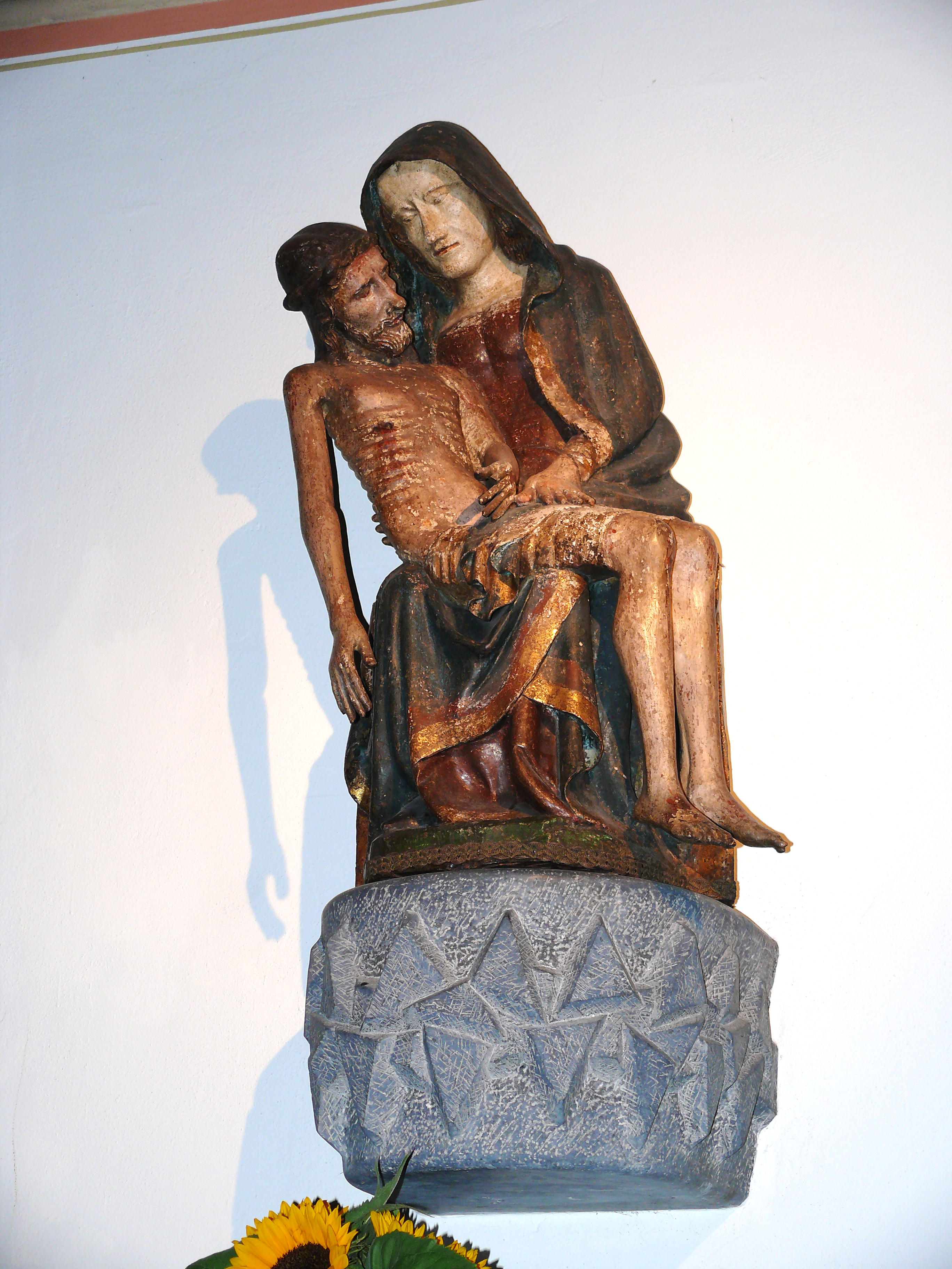 Gotische Pieta in der Marienkirche in Bonn-Bad Godesberg